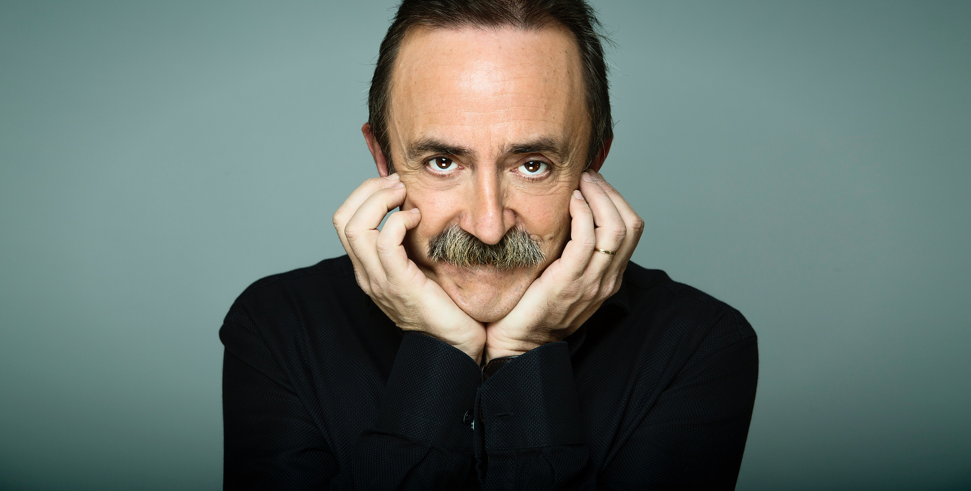 El cómico Santi Rodríguez